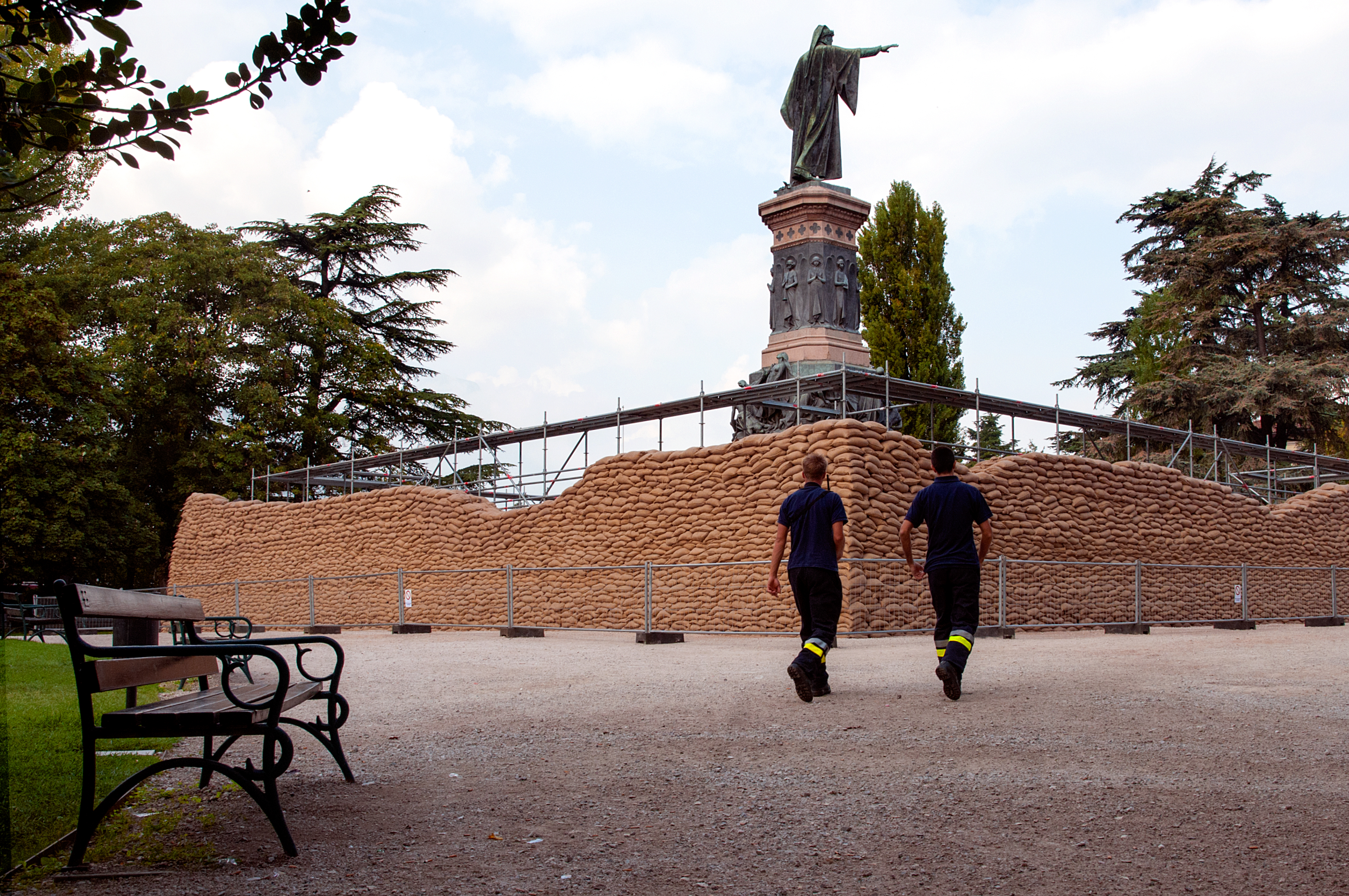 Parco di Piazza Dante This is a photo of a monument which is part of cultural heritage of Italy.